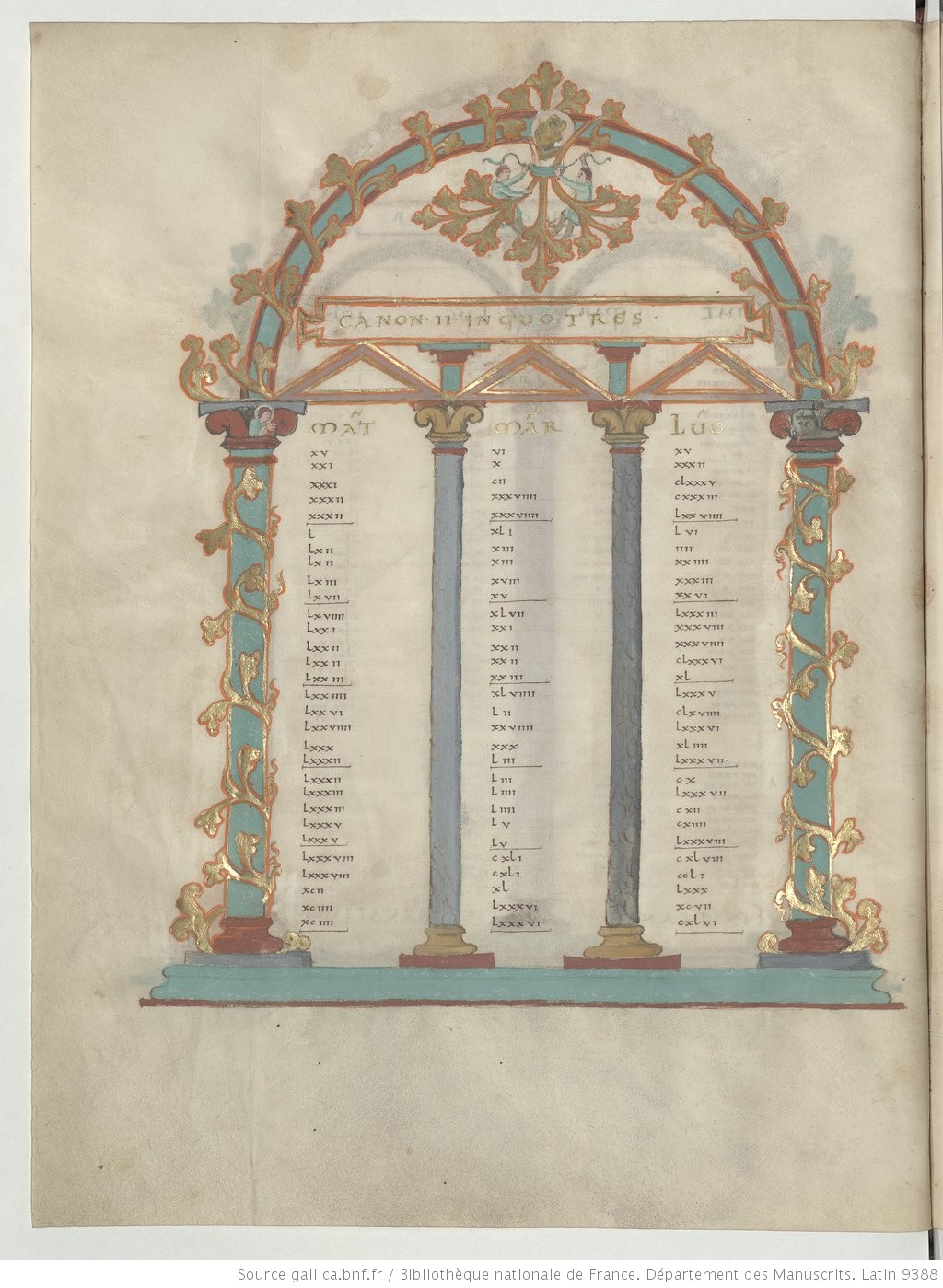 Évangiles dits de Drogon Table de canon-4